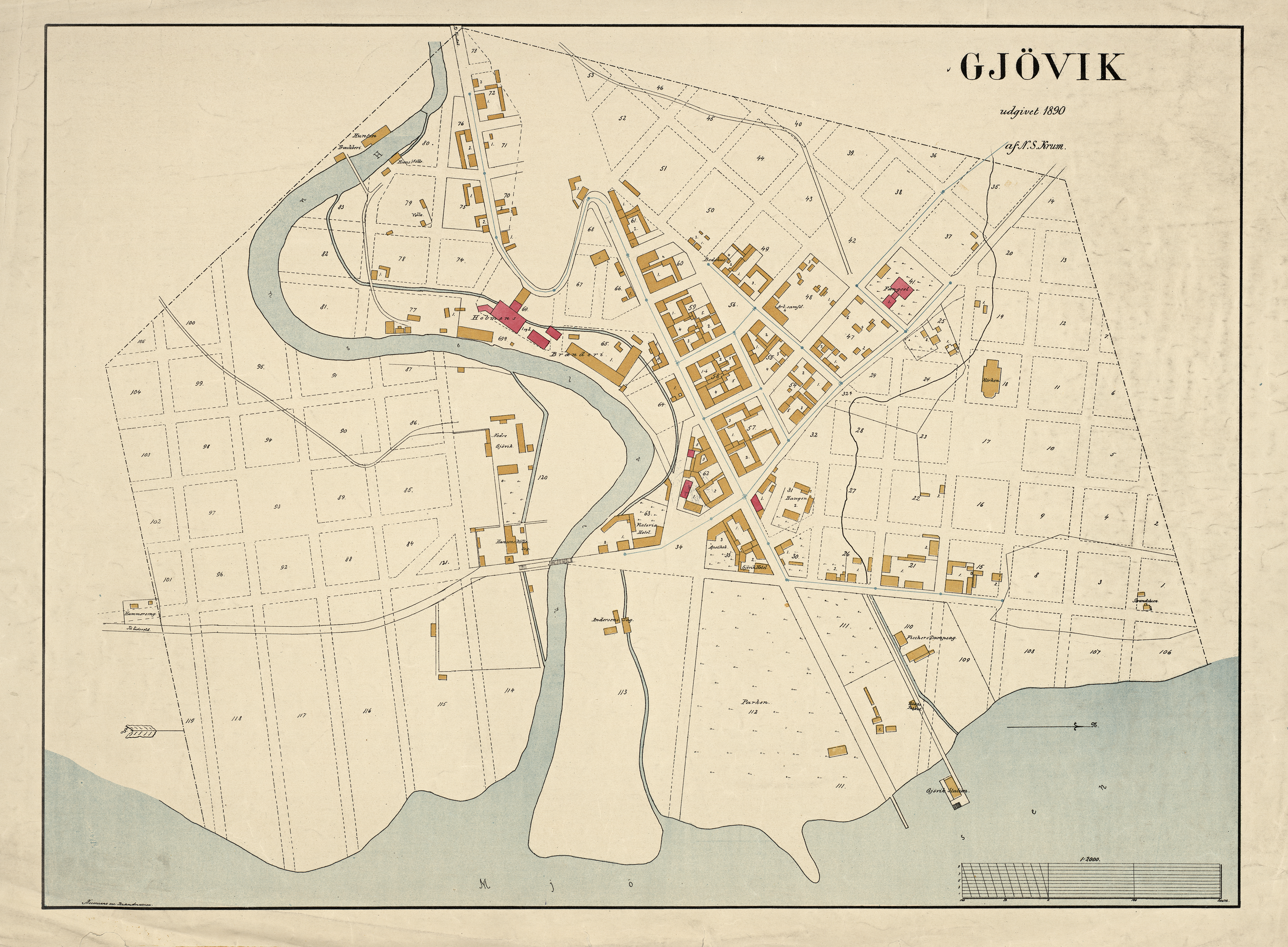 Kart over Gjøvik (1890)